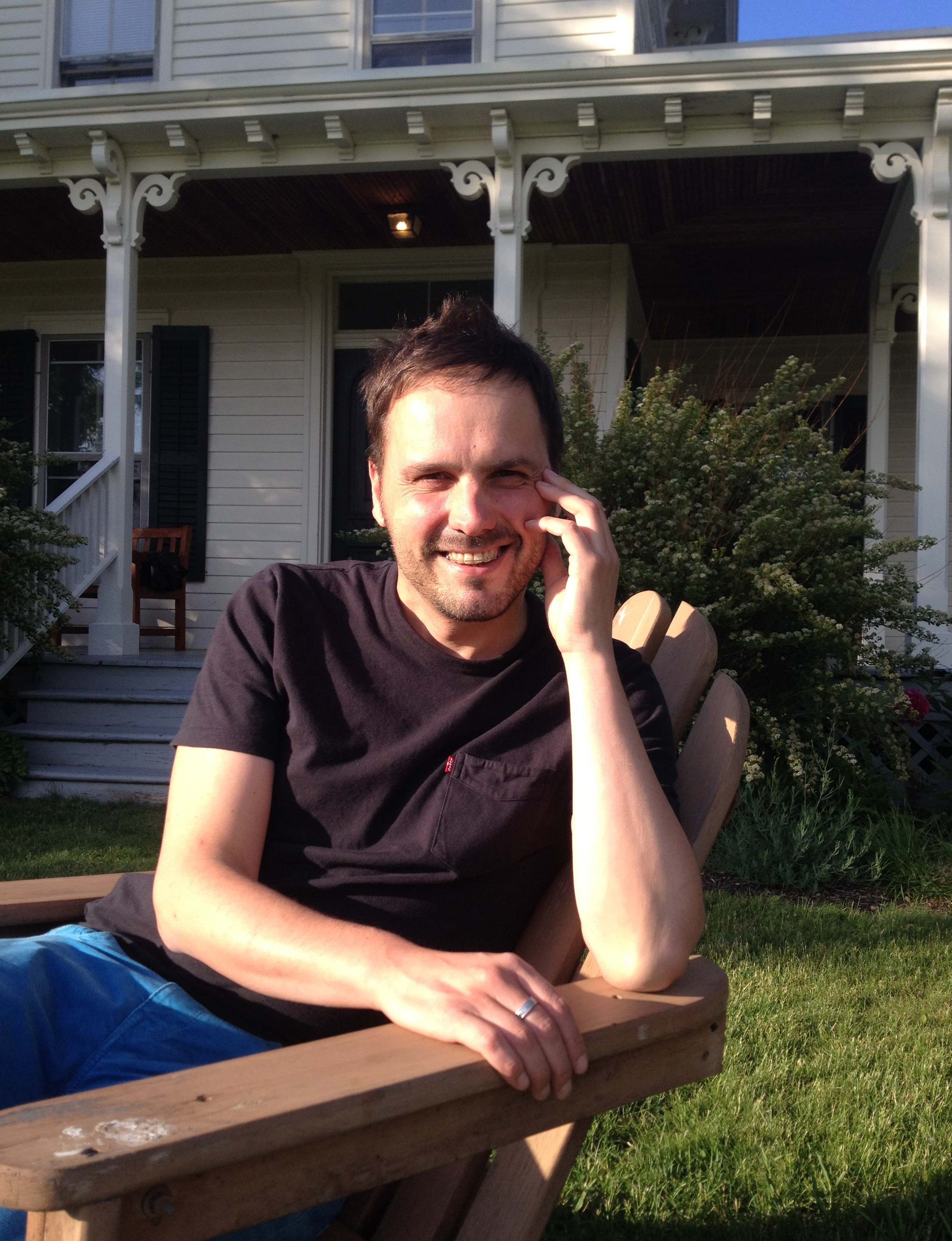 Kirmen Uribe idazlea